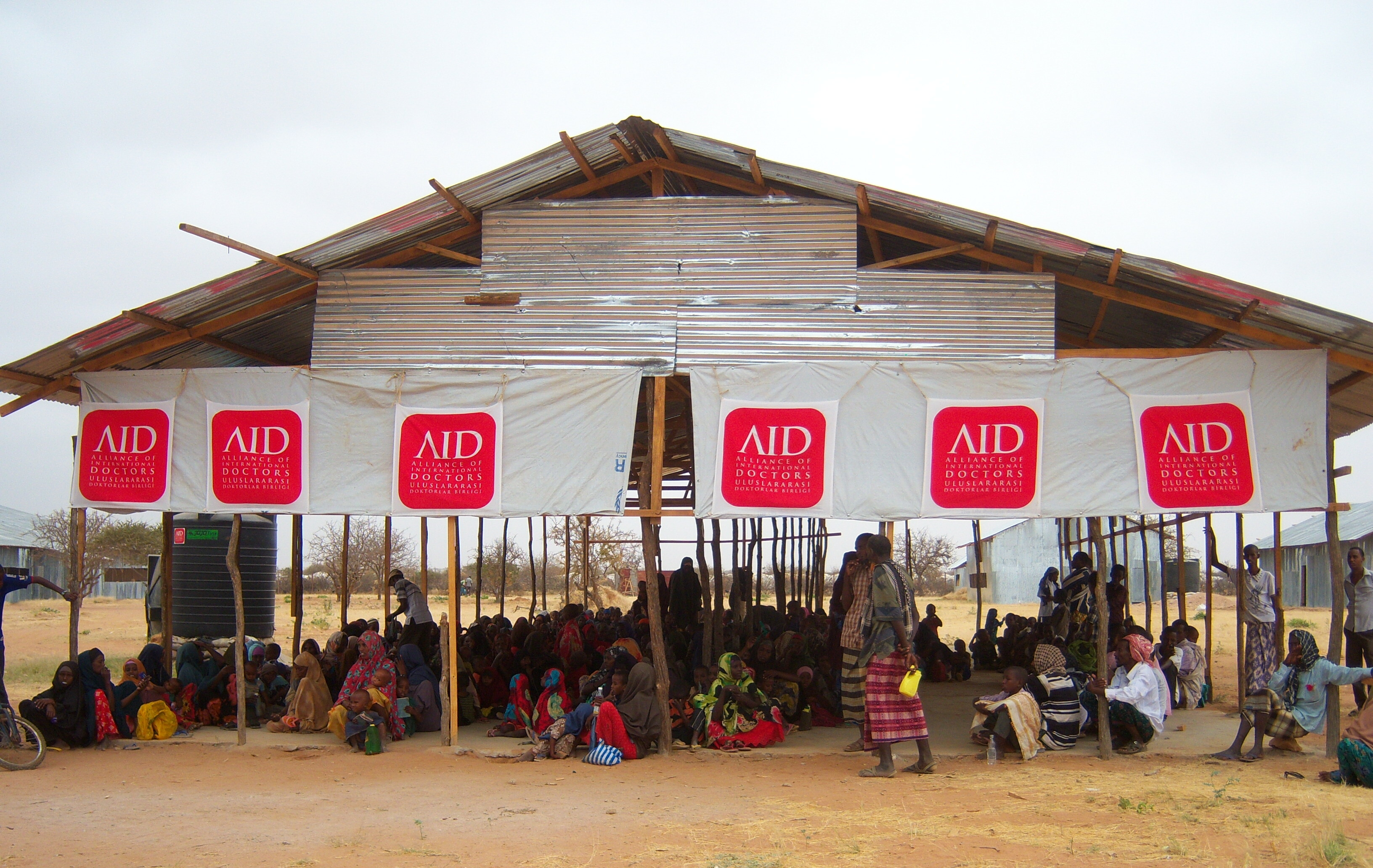 AID, Kenya'da Dadaab Mülteci Kampı'ndaki kliniğinde bir sene boyunca Somalili mültecilere sağlık hizmeti sundu.